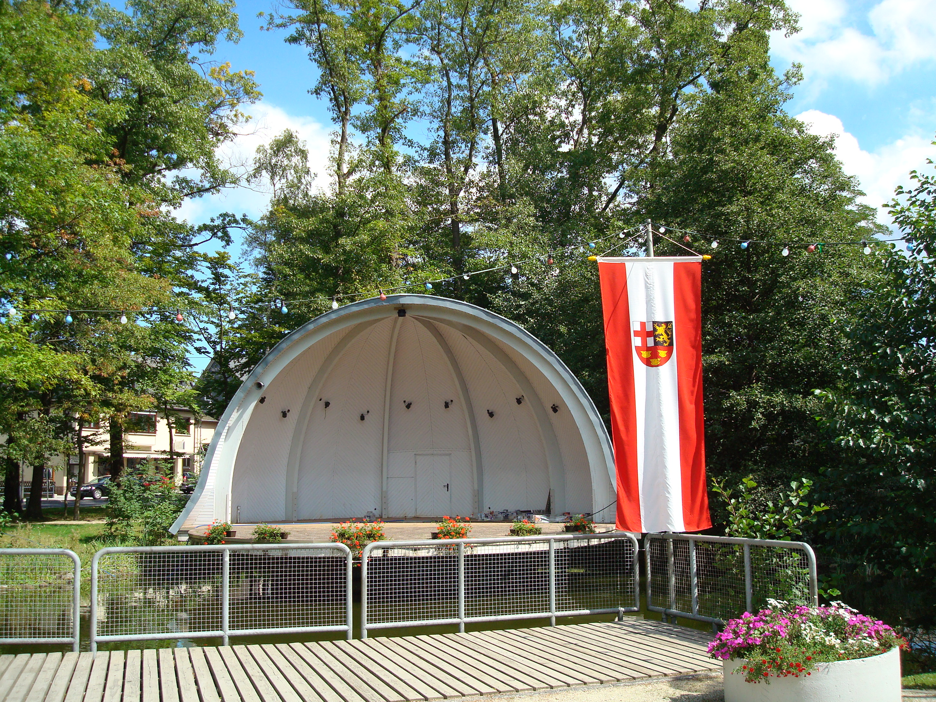 Konzermuschel im Park Emmelshausen, Gemeindefahne